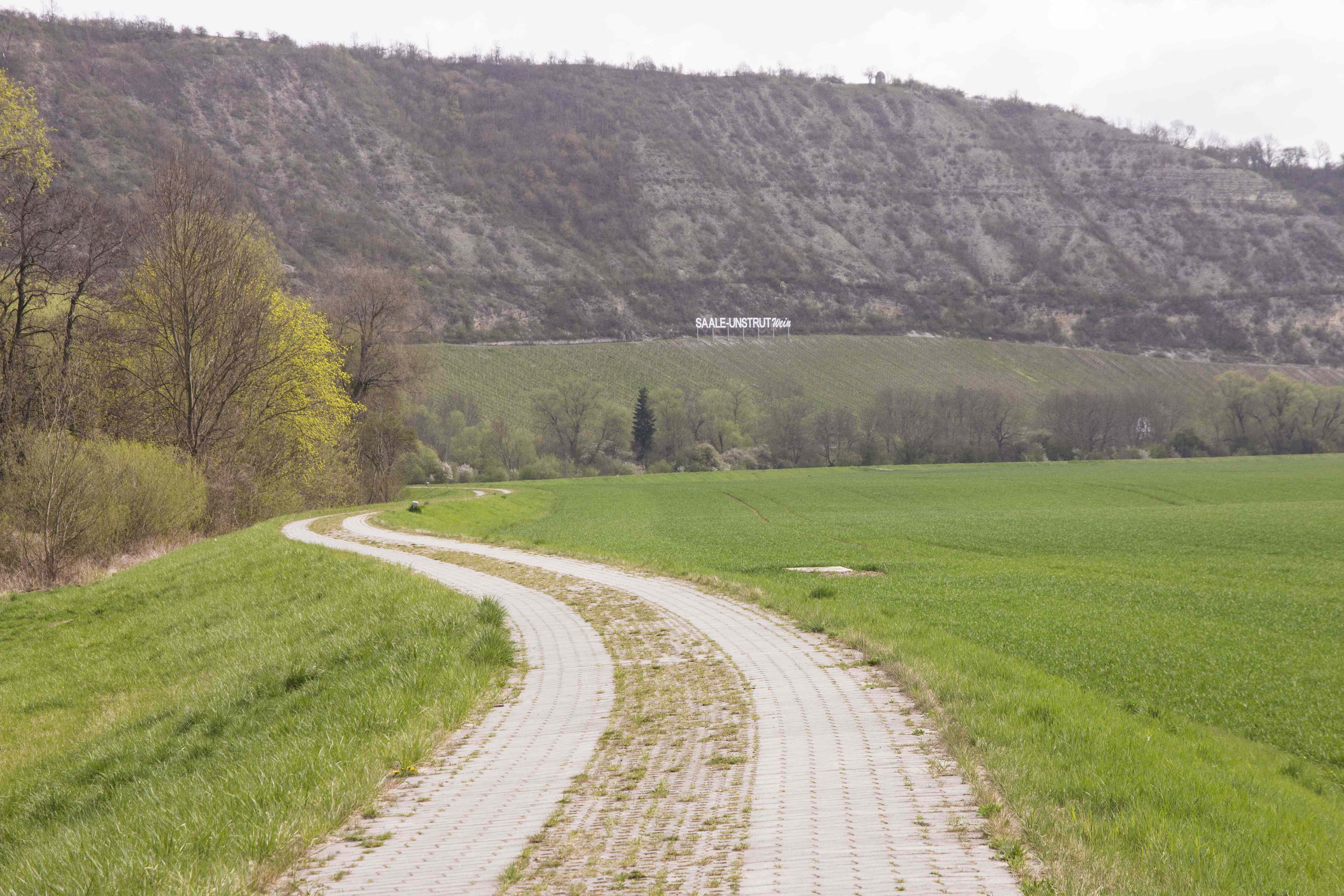 NSG Göttersitz und Weinanbau am Steilhang der Saale bei Bad Kösen